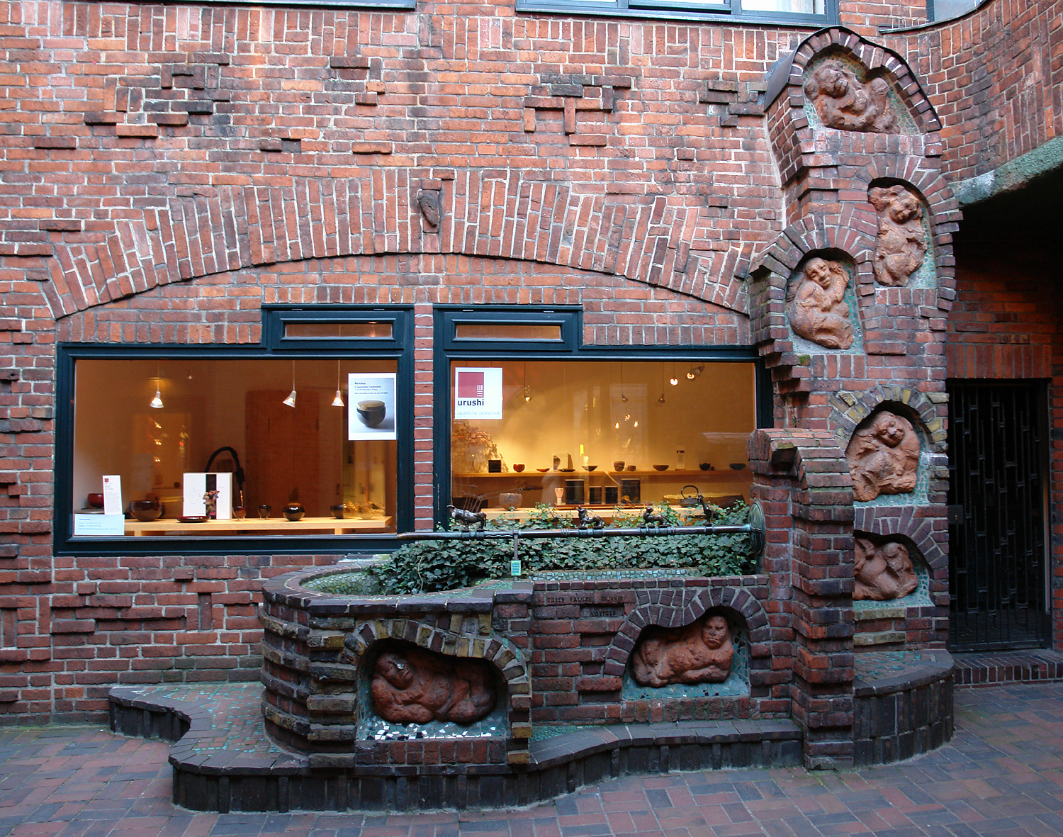 Bernhard Hoetger: Brunnenreliefs Die Sieben Faulen (1927, Terrakotta), Brunnenfiguren Die Bremer Stadtmusikanten (1927, Bronze). Standort: Handwerker-Hof in der Bremer Böttcherstraße Das abgebildete Objekt ist ein geschütztes Kulturdenkmal in der Freien Hansestadt Bremen, mit der Nr. 1503,T003 beim Landesamt für Denkmalpflege registriert.